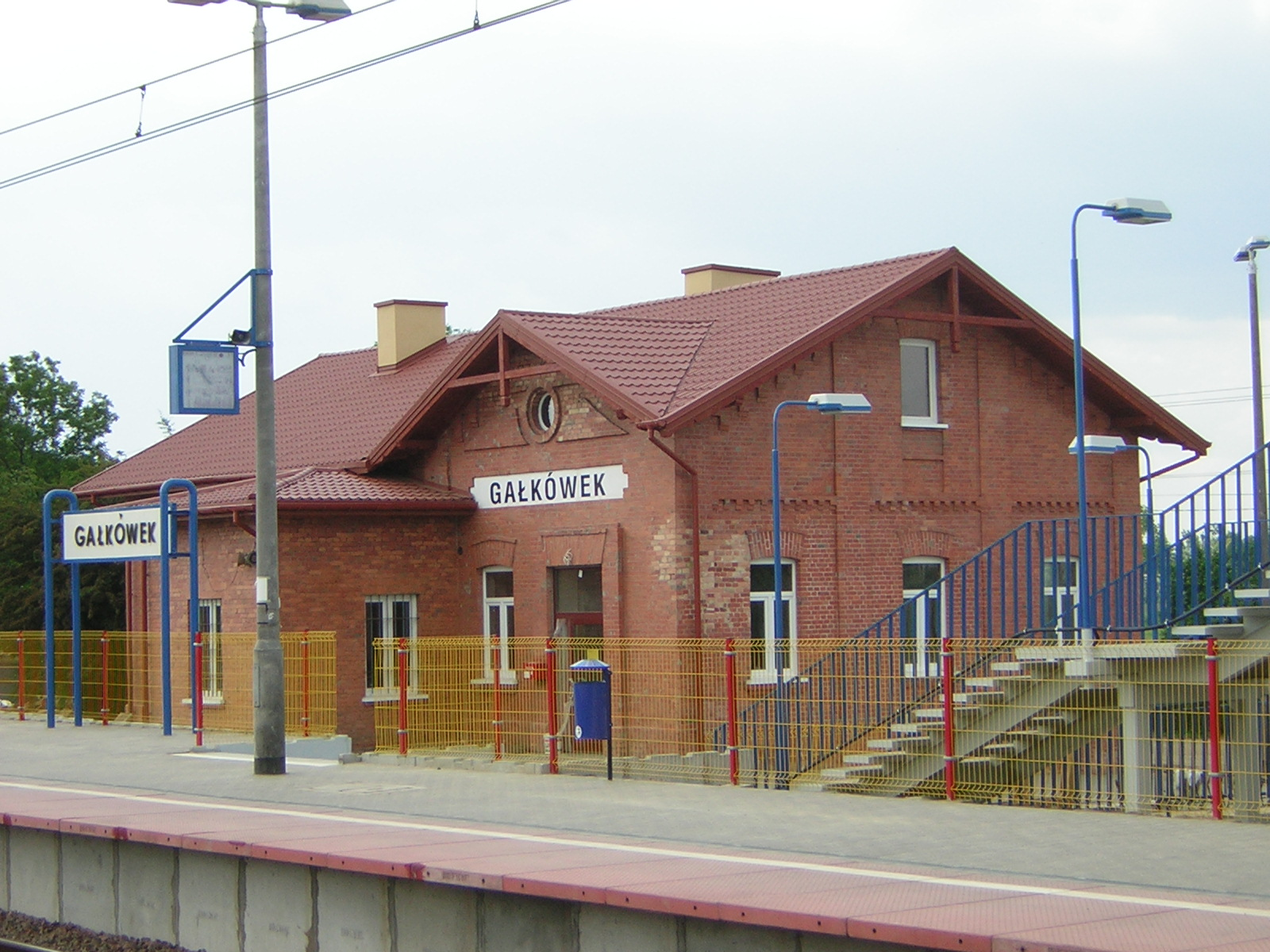 Stacja w Gałkówku.